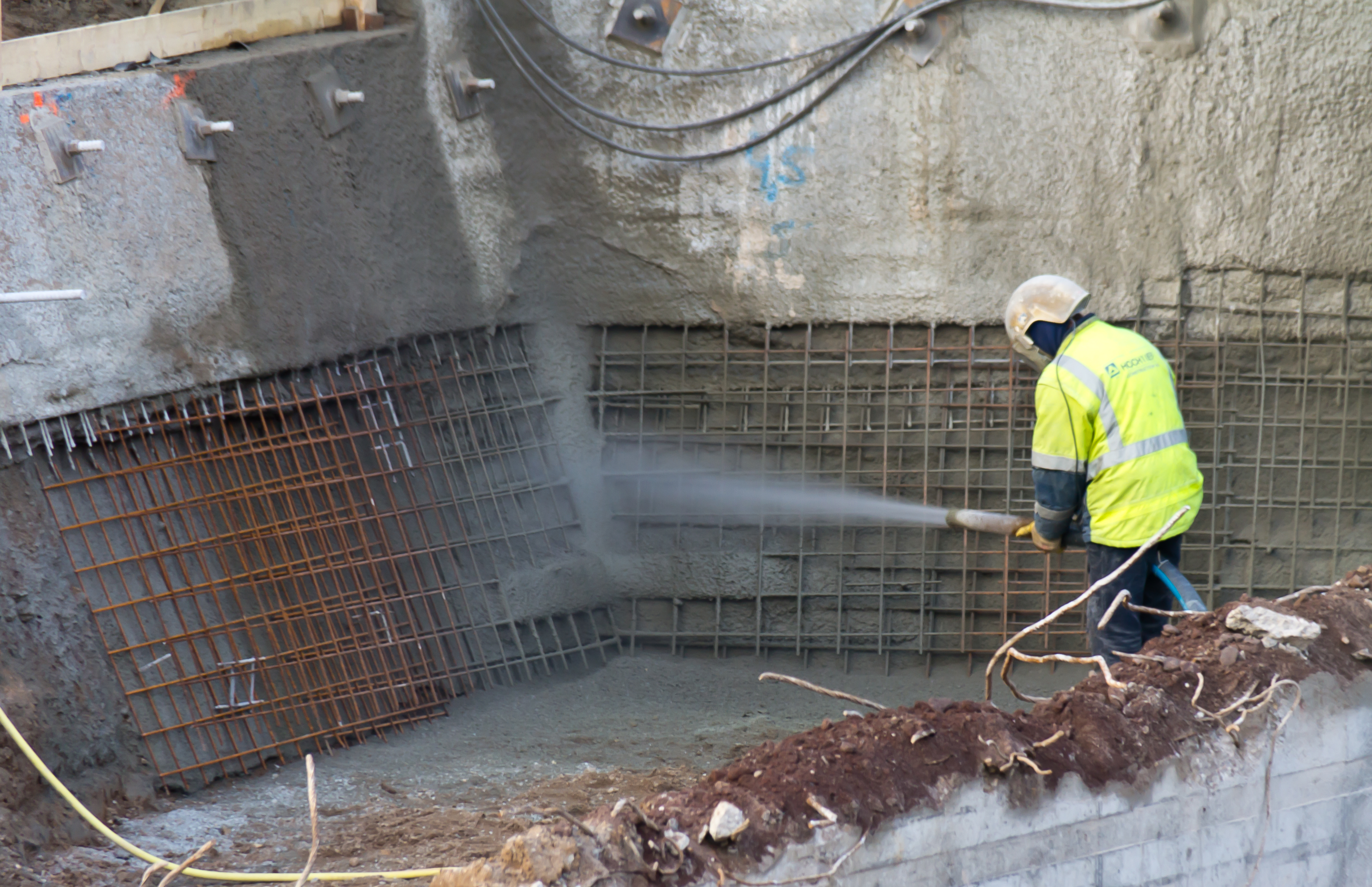 Köln: Neugestaltung östliche Domumgebung. Ein Bauarbeiter trägt Spritzbeton auf Betonstahlmatten auf